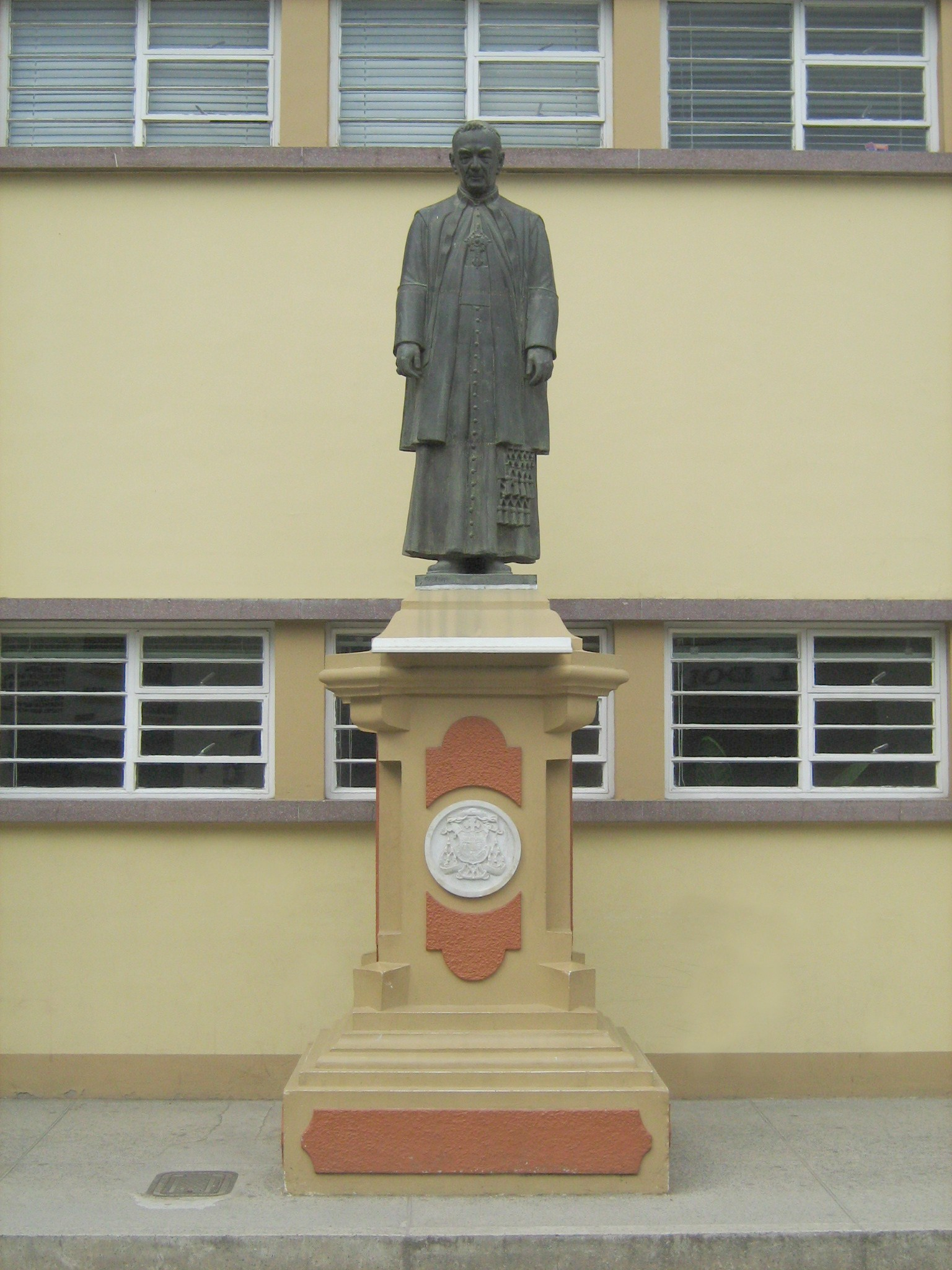 Estatua de Miguel Ángel Builes, en el municipio de Santa Rosa de Osos, Antioquia. Colombia.